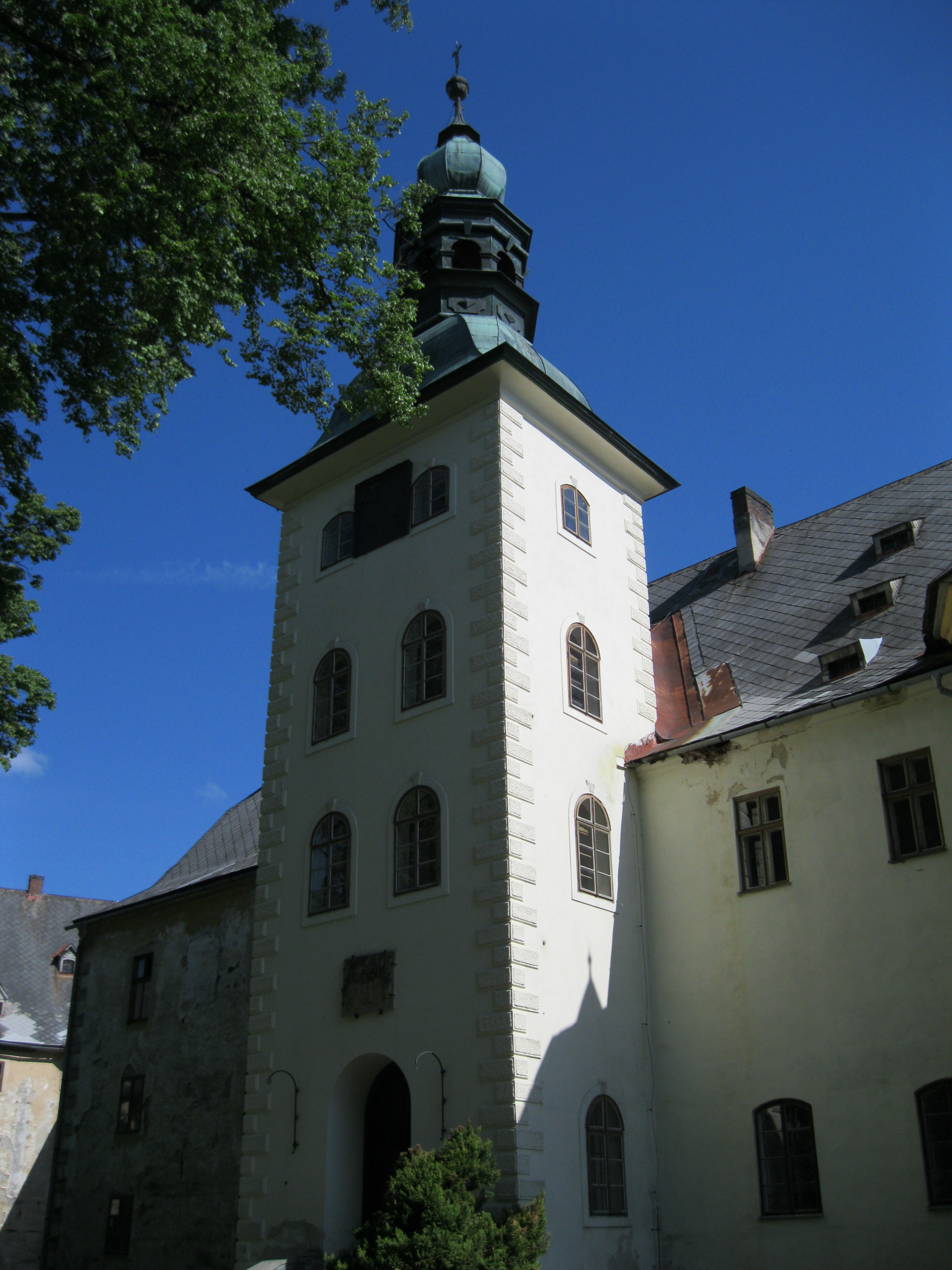 Zámek s parkem, s bývalým pivovarem a přiléhající branou Janovice